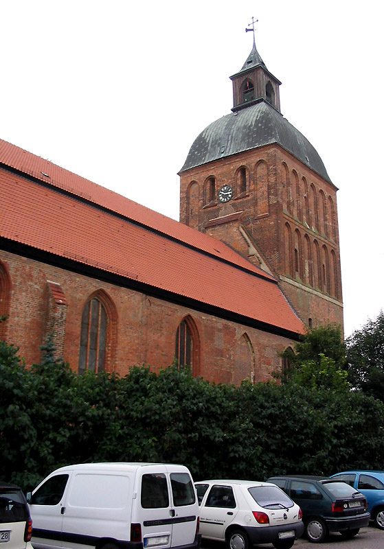 Marienkirche (erbaut: wahrscheinlich 1233), mehrmals zerstört worden, deswegen trägt sie mehrere verschiedene Baustile